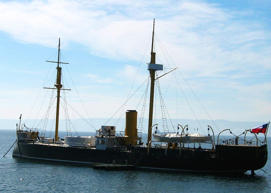 El monitor Huáscar en la bahía de Concepción, puerto militar de Talcahuano, frente al edificio de la Comandancia en Jefe de la Segunda Zona Naval, VIII región Chile